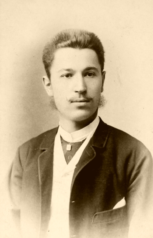 Széll Kálmán (1843–1915) miniszterelnök, pénzügyminiszter fiatal korában